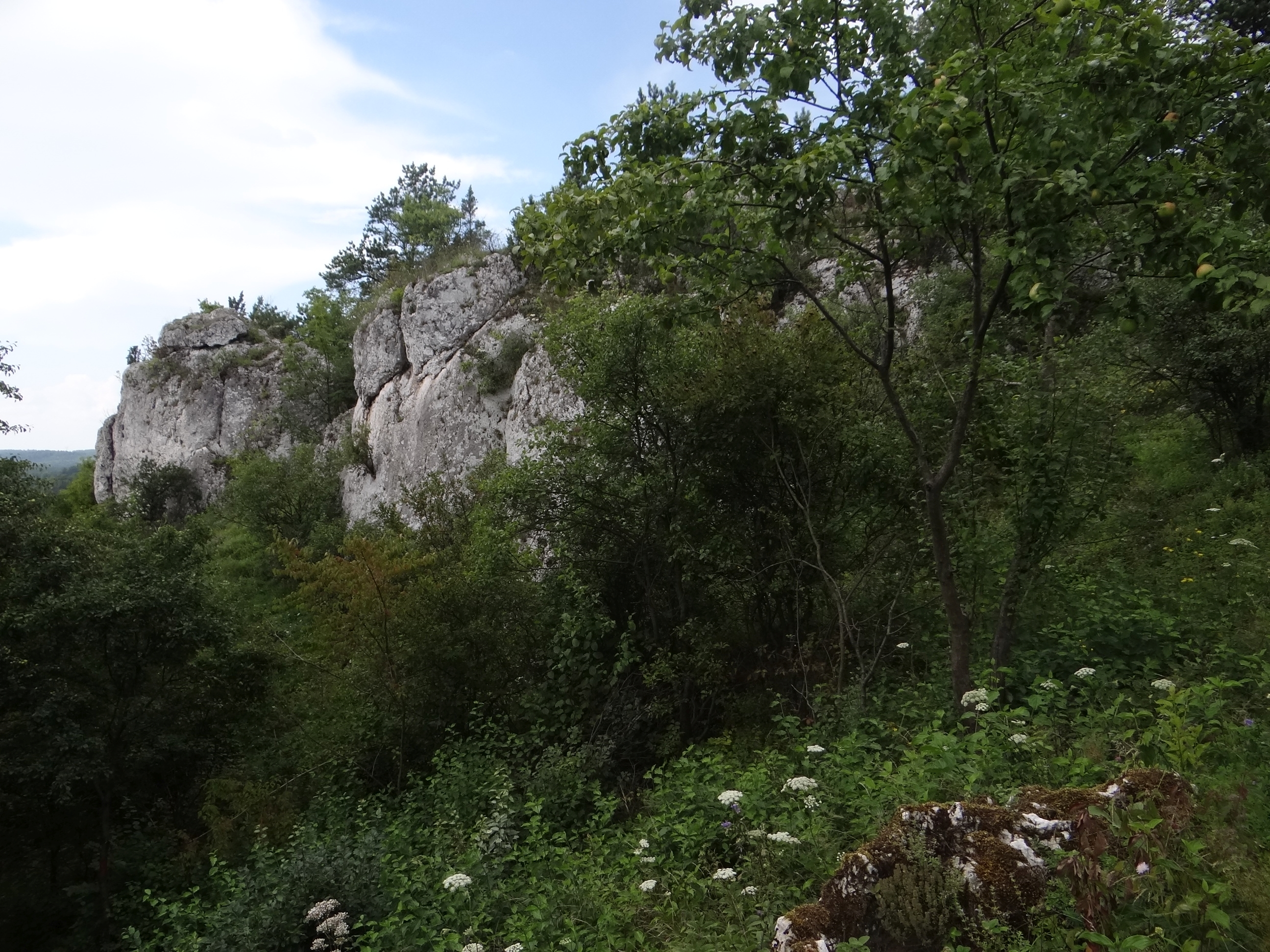 Straszykowe Skały na szczycie Straszykowej Góry